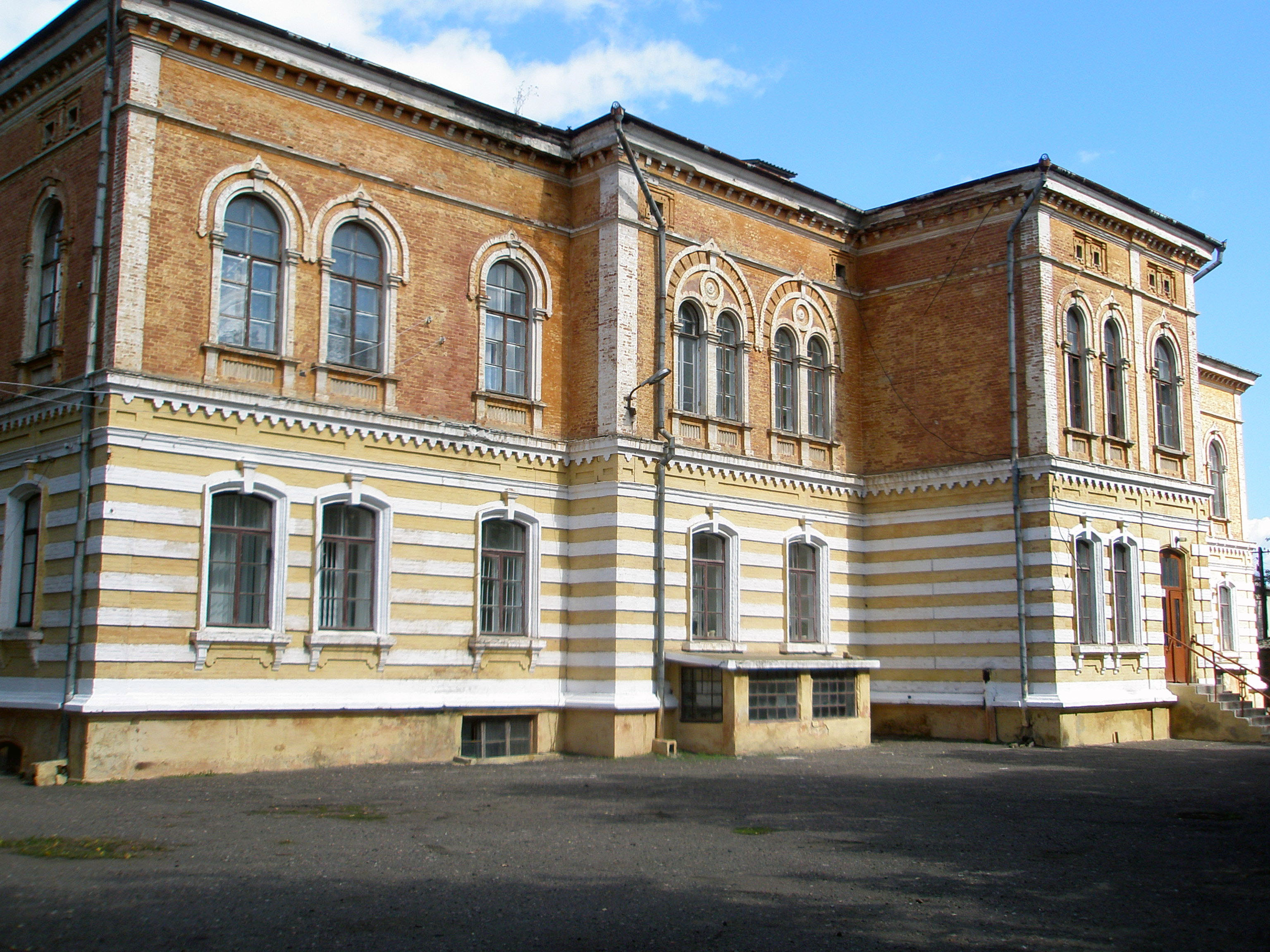 Будівля земської управи, Білгород-Дністровський, Першотравнева вул., 53